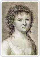 Diodata Saluzzo - Ritratto 1